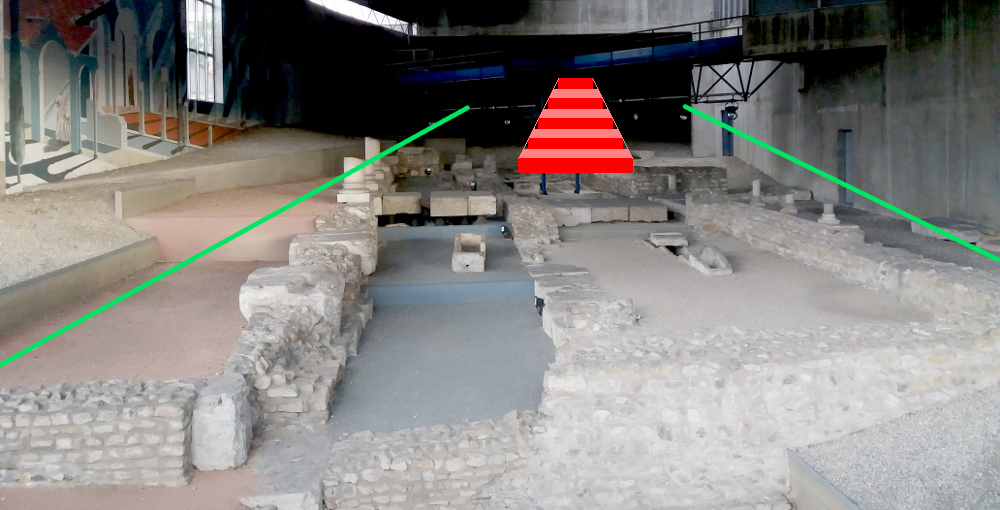 Schéma de l'ancienne montée Saint-Clair-Duport au-dessus des vestiges de la basilique Saint-Laurent de Choulans. Les limites de la chaussée en vert et l'escalier qui terminait la montée en rouge.